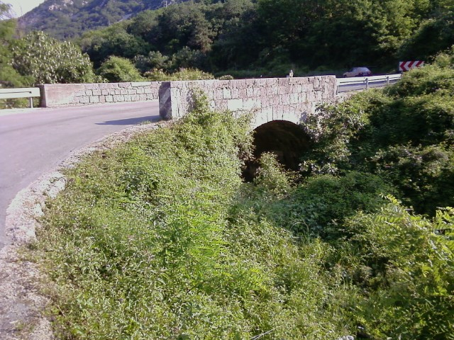 Stari kameni mostić državne ceste D102, glavne prometnice na otoku Krku, preko rijeke Suha Ričina ili Vela Rika, jedinog stalnog vodotoka na hrvatskim otocima.